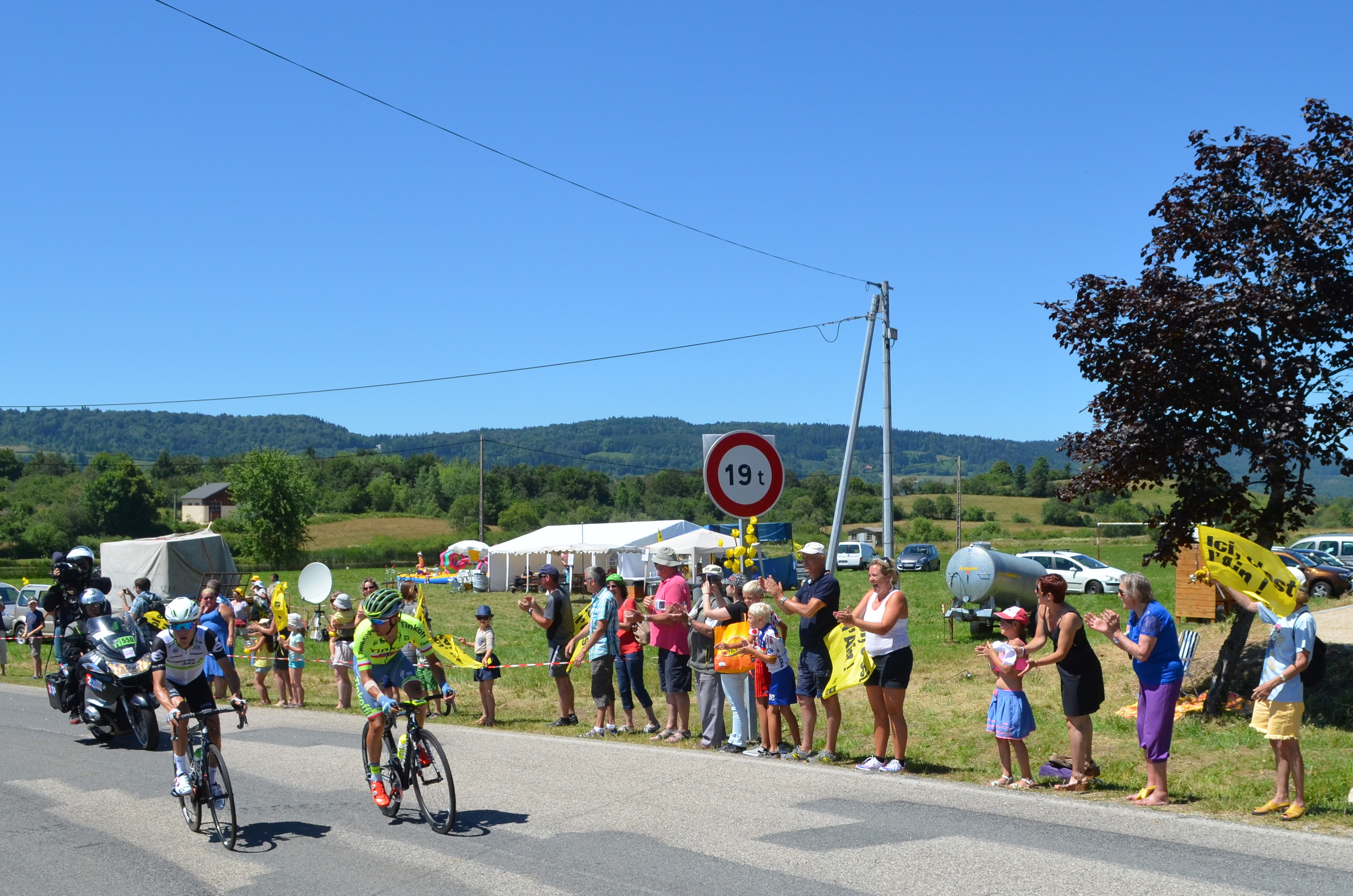 Tour de France 2016, étape 15 dans l'Ain : Bourg-en-Bresse.